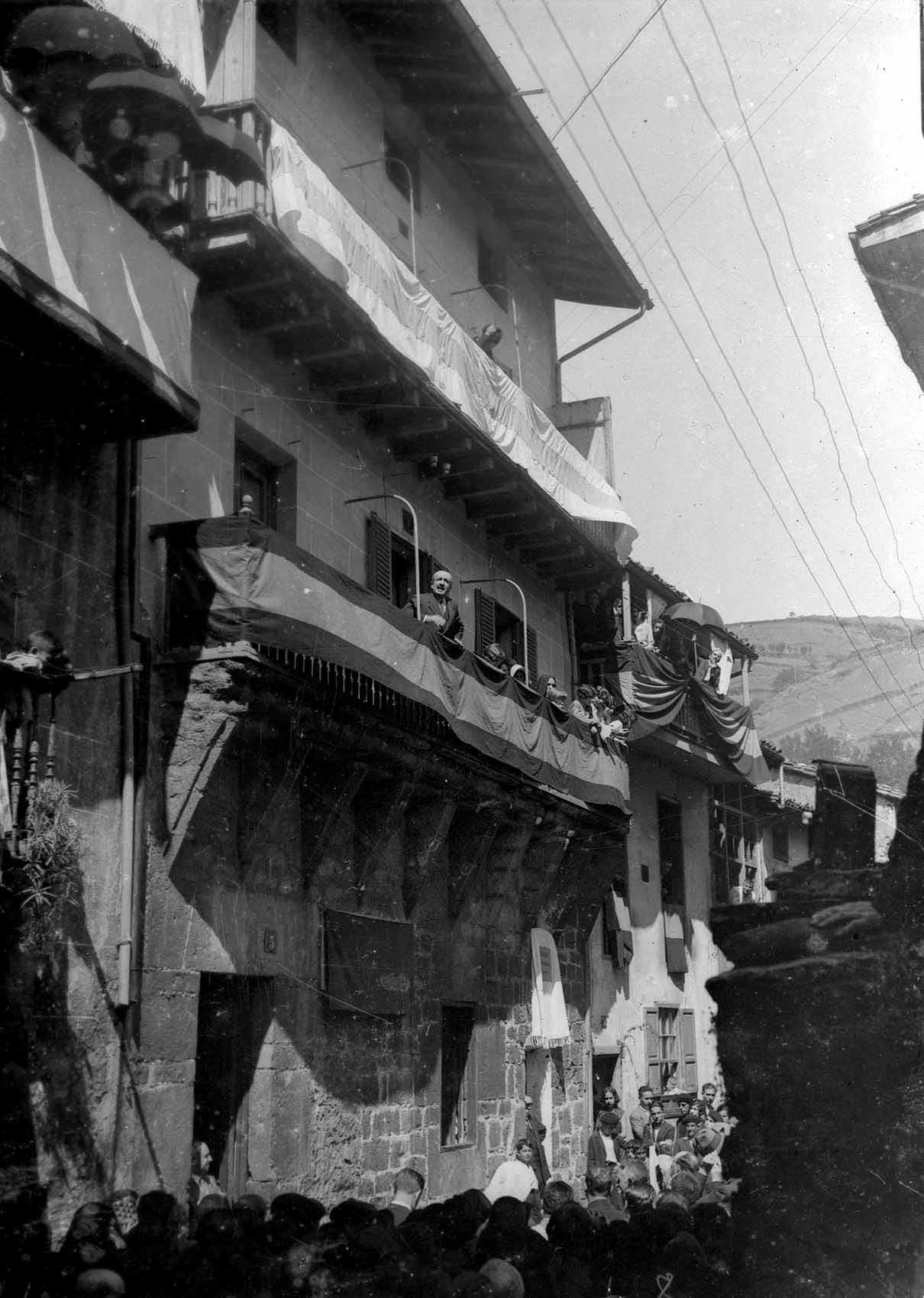 Vergara. 1930. Casa natal de Luis de Eleizalde Localización: Vergara